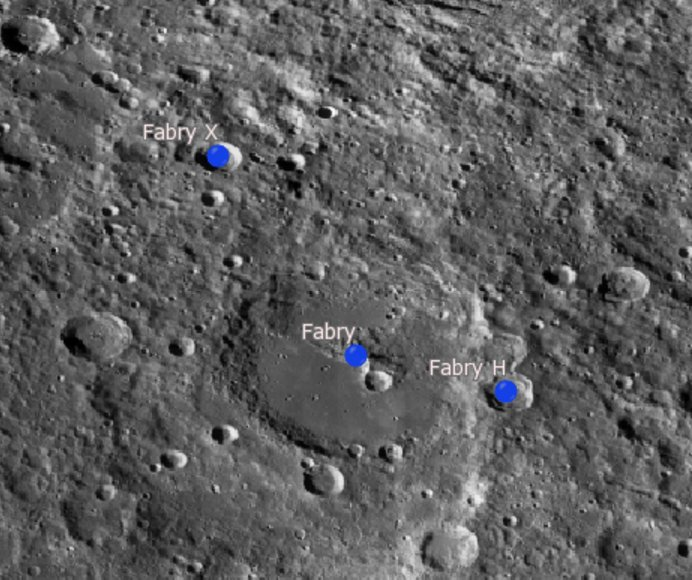 Cráter lunar Fabry. Cráteres satélite. (Imagen LROC)